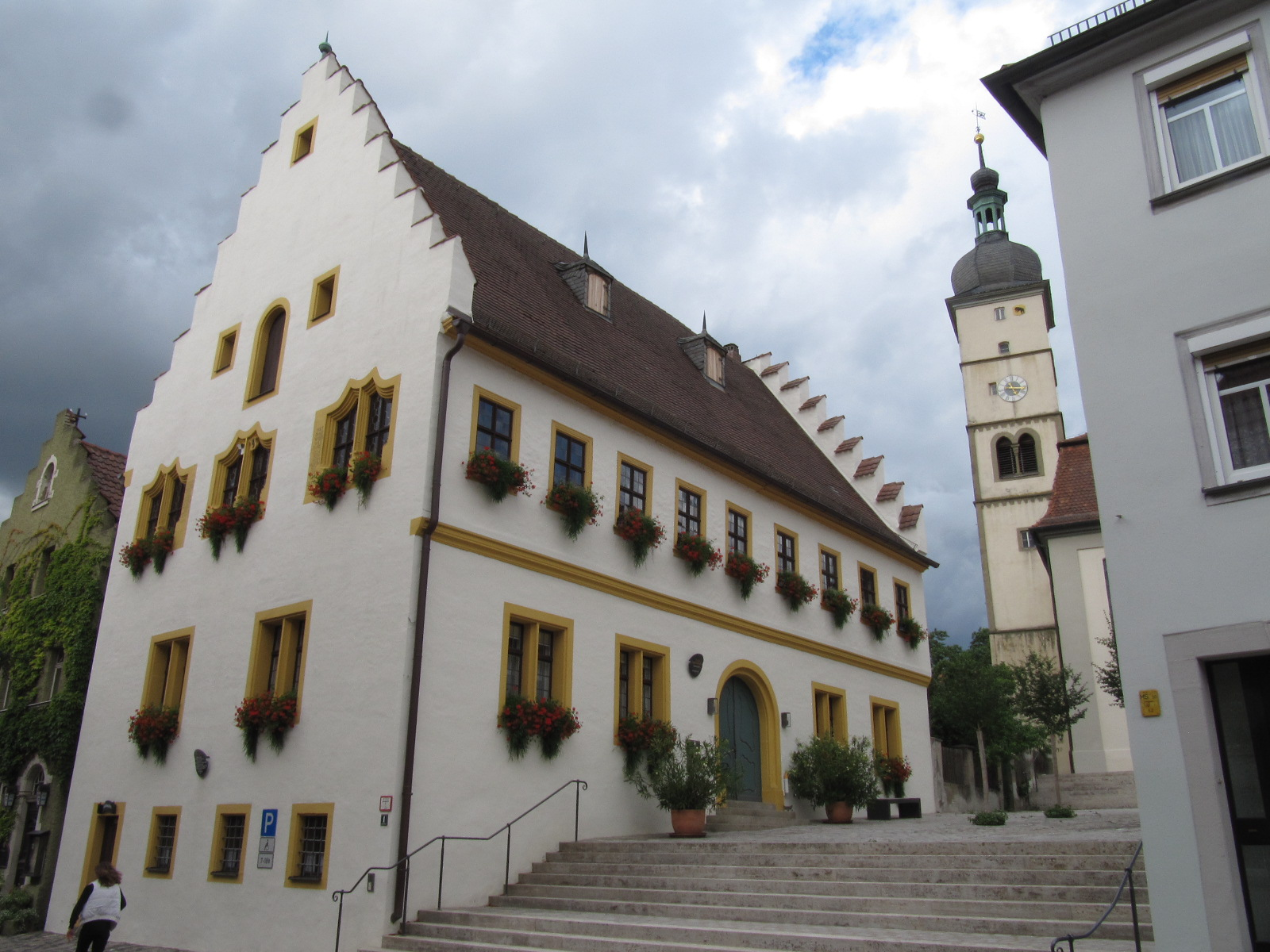 Blick auf das Rathaus der Stadt Mainbernheim von der Herrnstraße aus